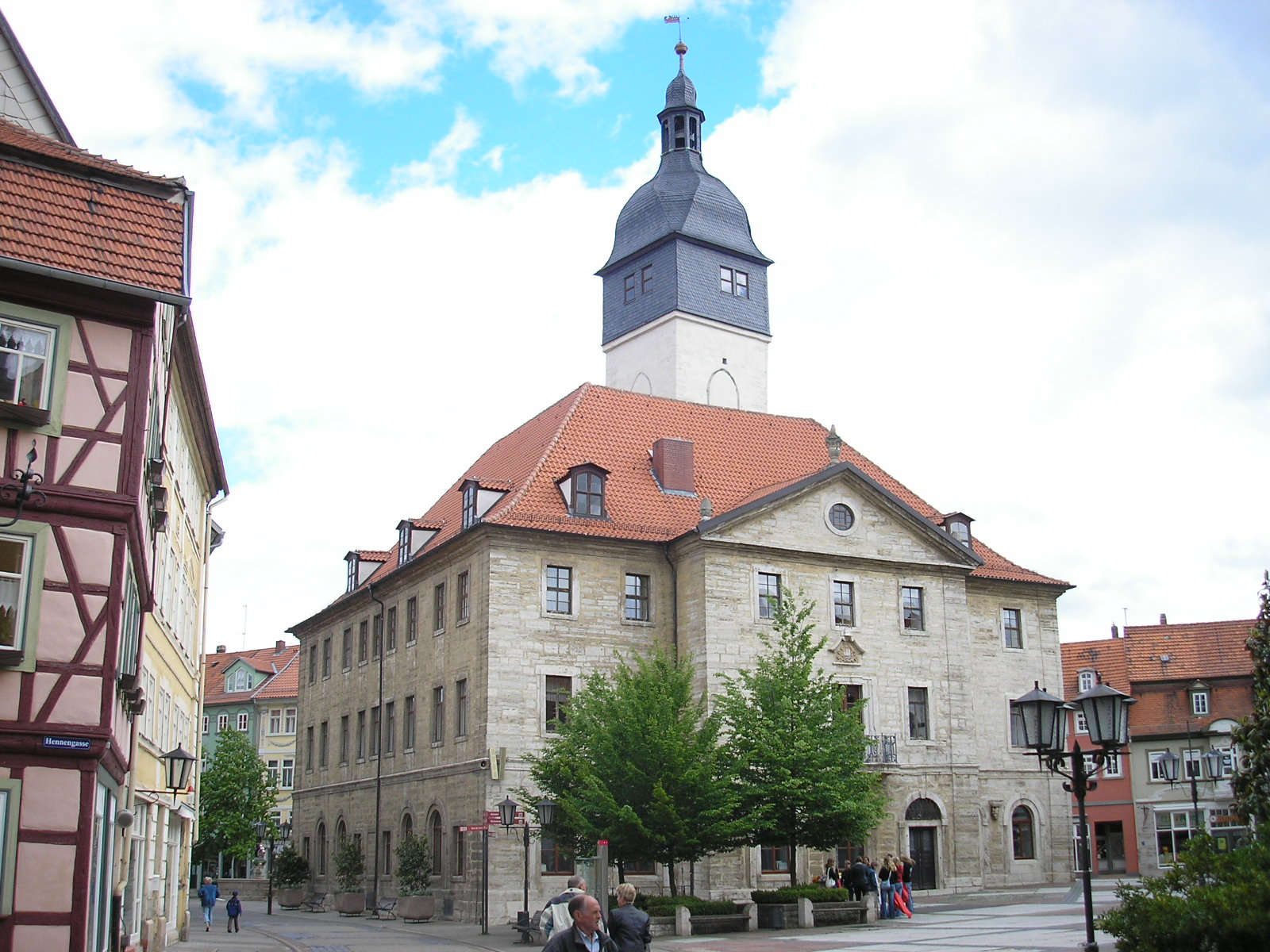 Das Rathaus von Bad Langensalza (Thüringen)